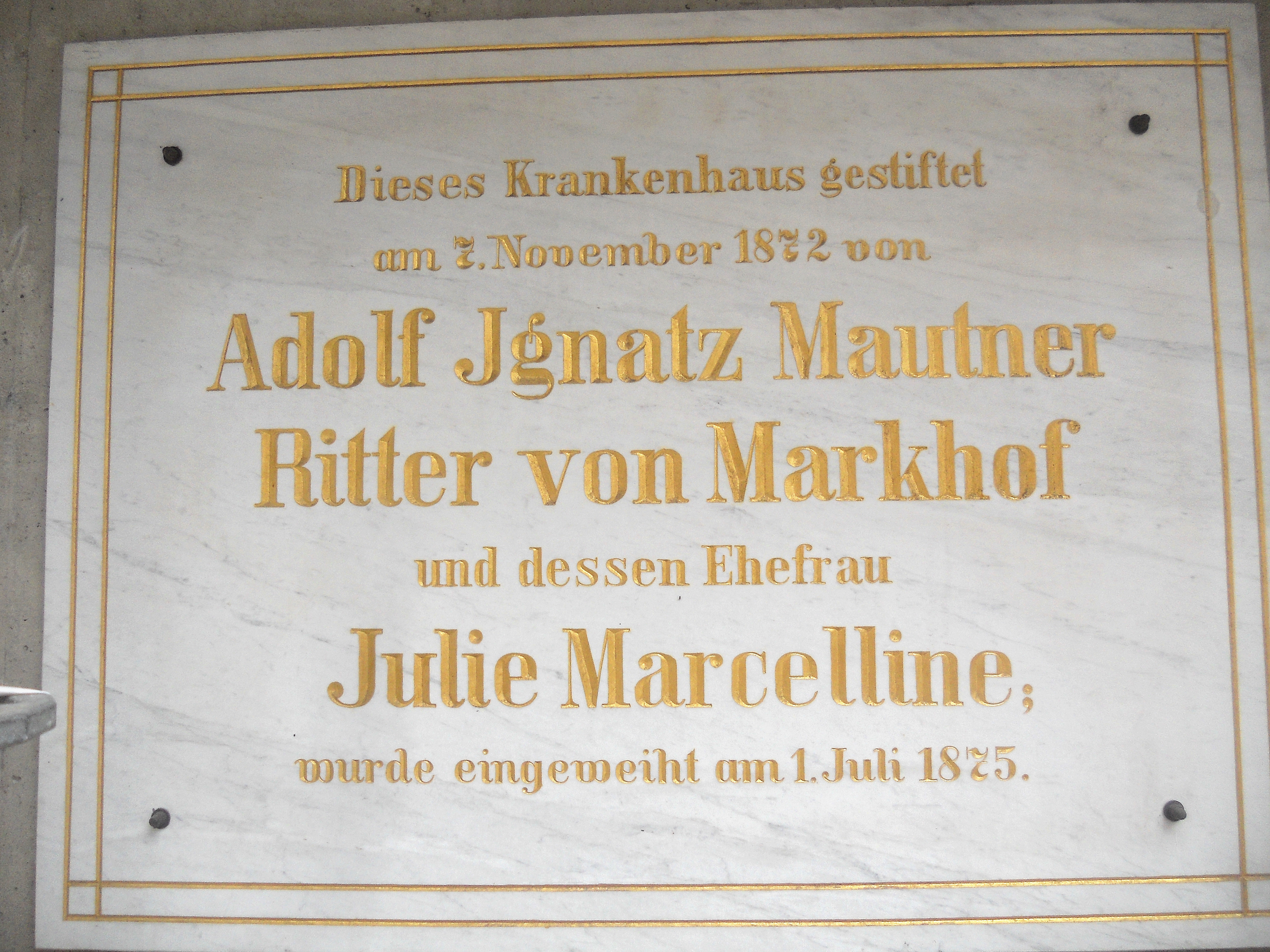 Stiftertafel des Mautner Markhof'schen Kinderspitals